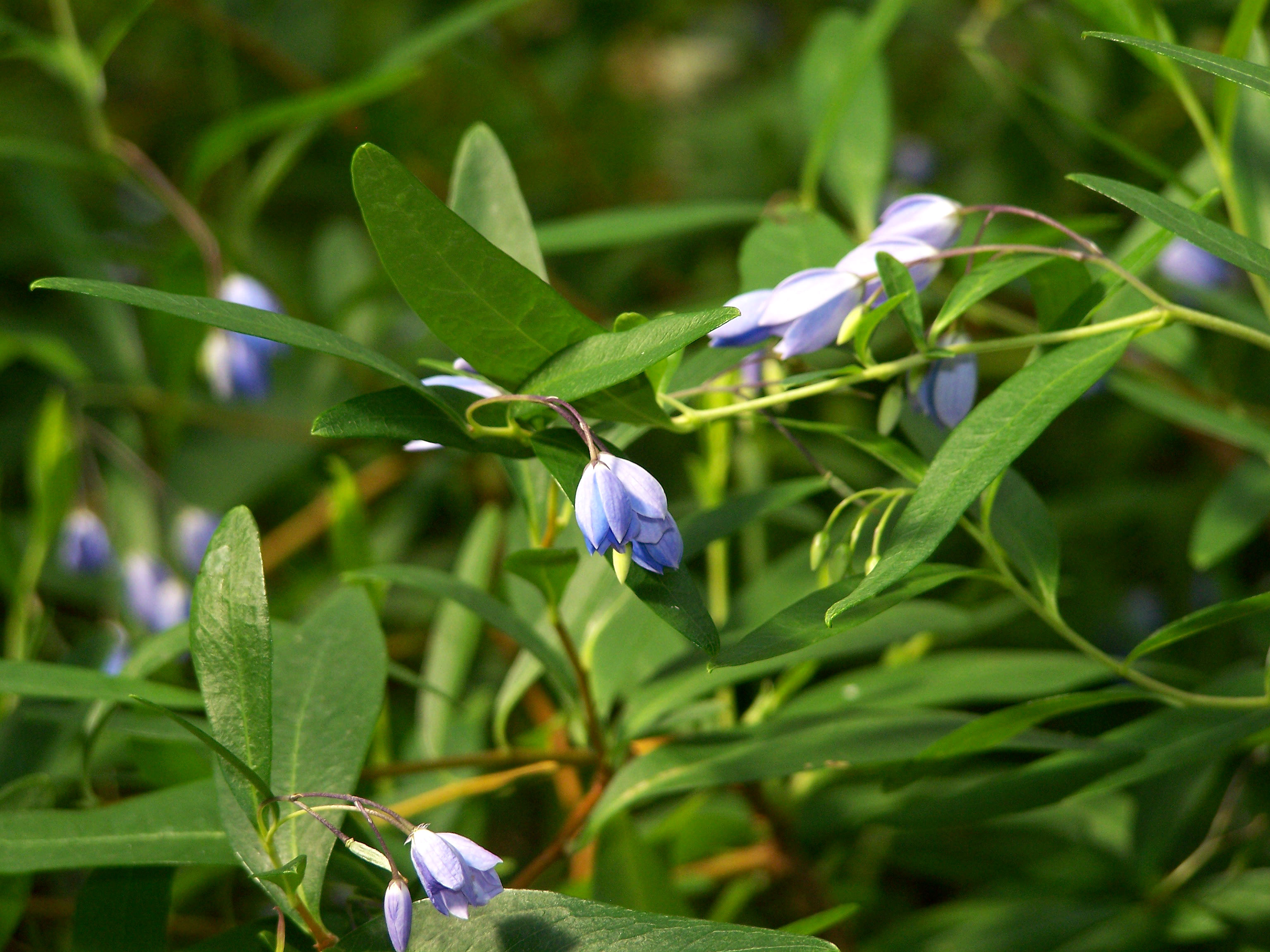 Verschiedenblättrige Sollya, Botanischer Garten Berlin